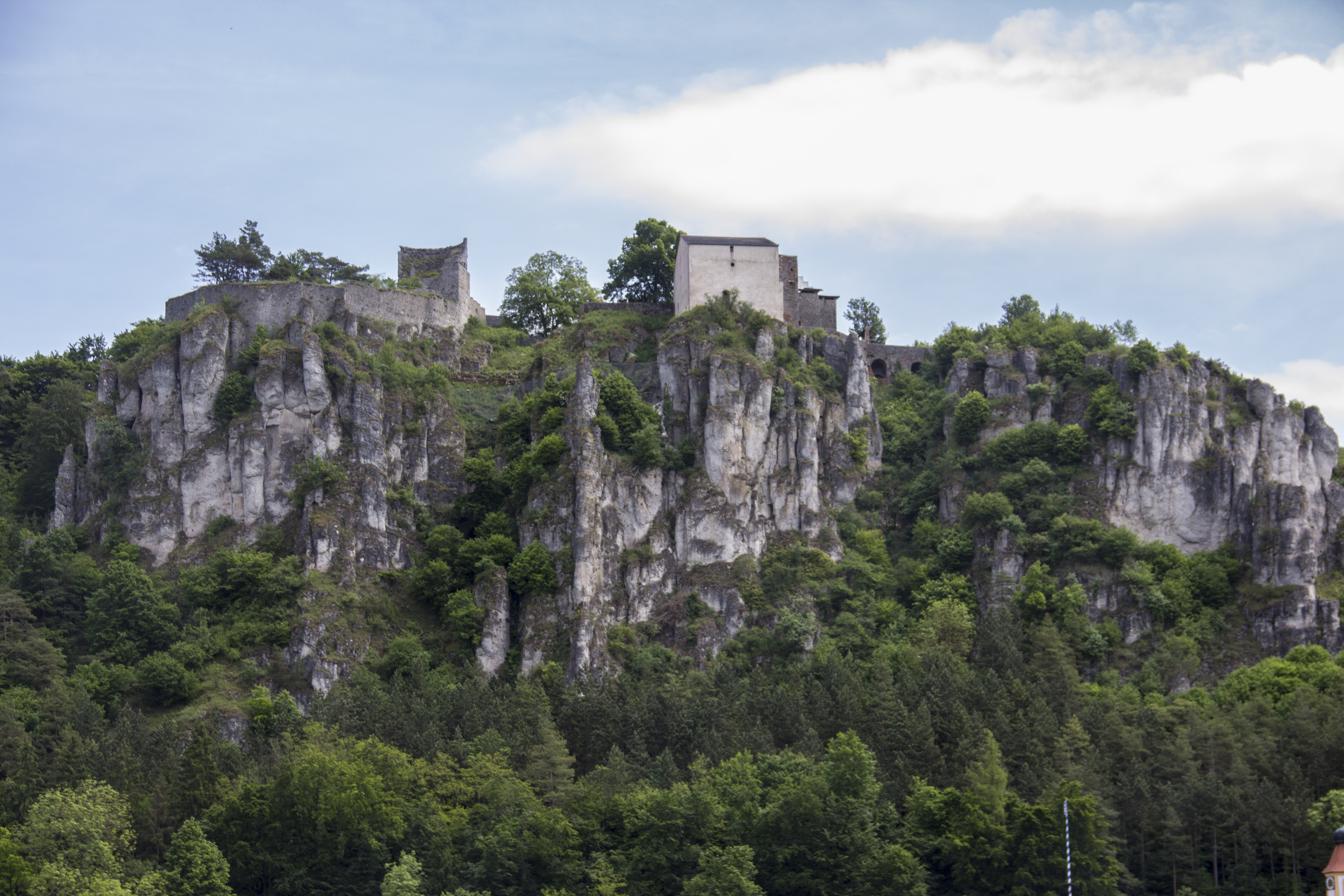 Arnsberg, Burg Arnsberg